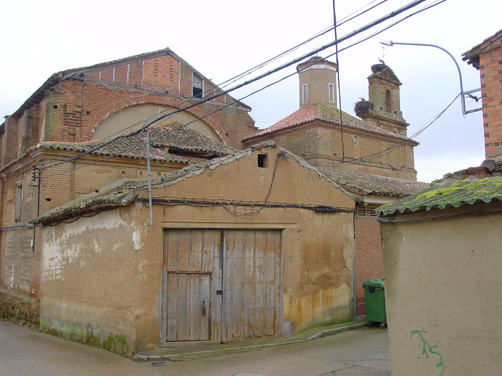 Valderas (León, España). Arquitectura urbana.